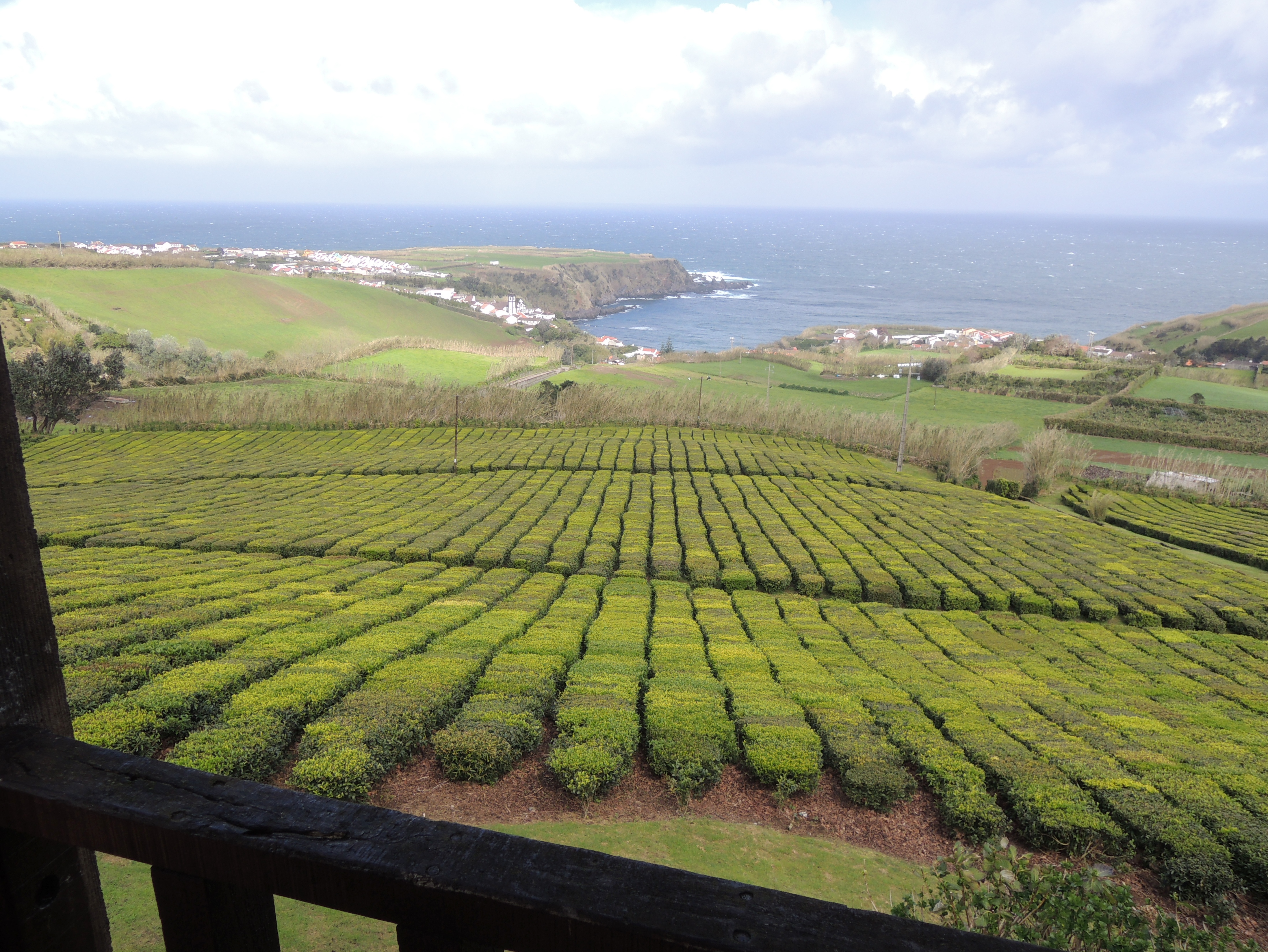 View on tea fields of Chá Porto Formoso